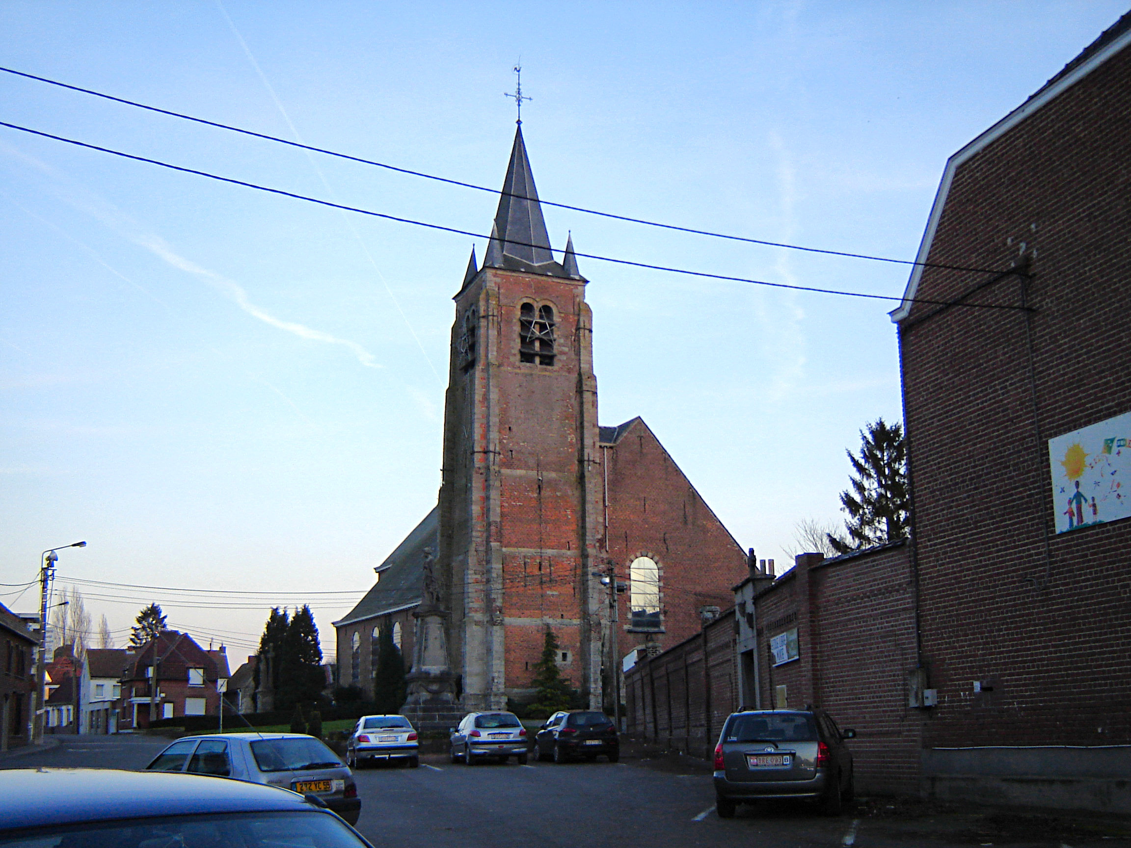 Eglise Saint-Eleuthère in Blandain, Tournai, Hainaut, Belgium